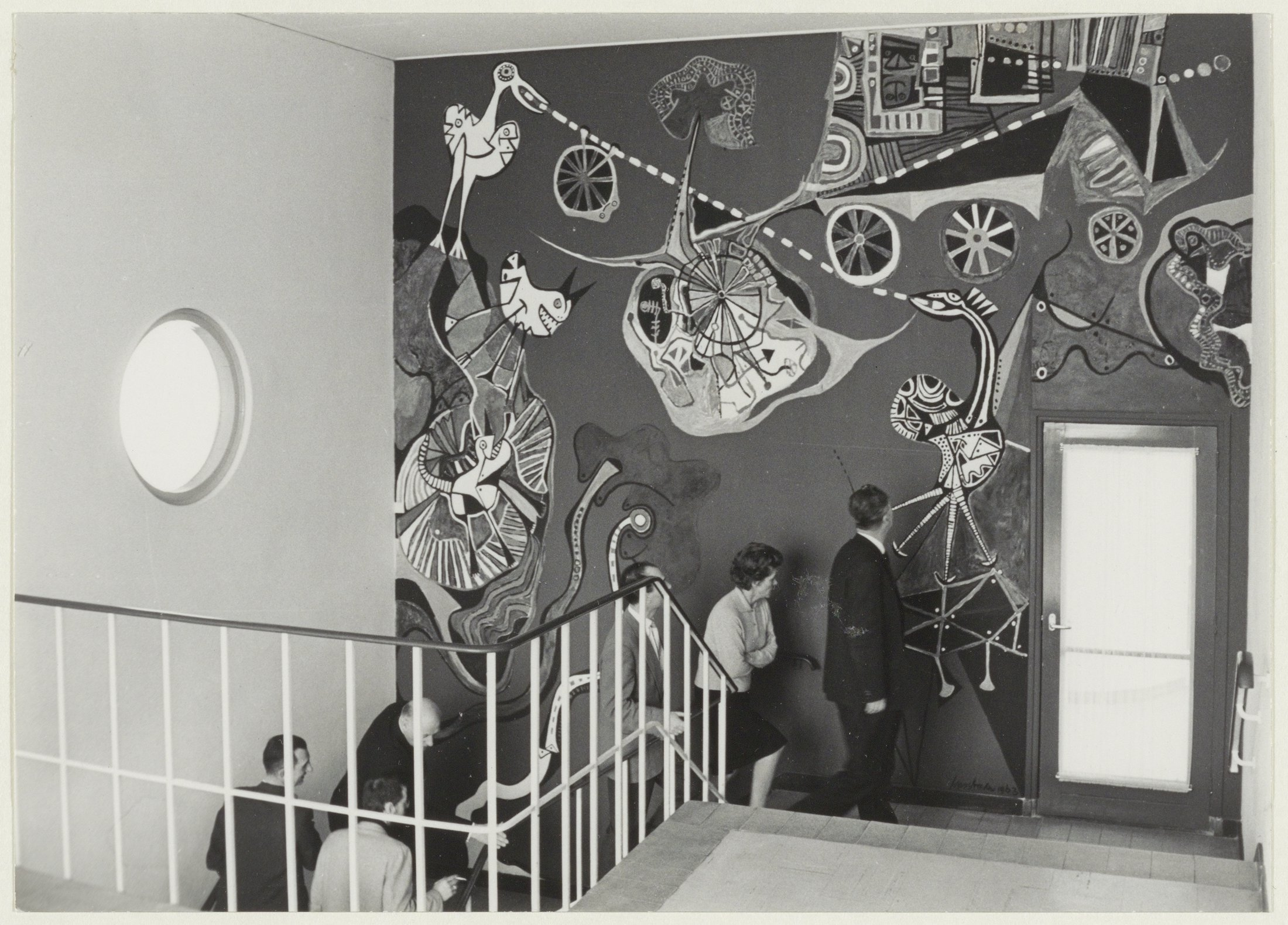 CollectieCollectie Fotoburo de BoerInventarisnummerNL-HlmNHA_54008973BeschrijvingWandschildering van Postma in het LorentzlyceumFotonummerNL-HlmNHA_1478_3628DocumenttypeTopografische prenten, tekeningen en foto'sVervaardigerBoer, Cees de (1918-1985) Soort vervaardigerFotograaf Interieur/ExterieurinterieurAnnotatiesG3-24LandNederland ProvincieNoord-Holland GemeenteHaarlem PlaatsHaarlem StraatSantpoorterplein Begindatum1963Einddatum1963TechniekFoto Trefwoordenscholen